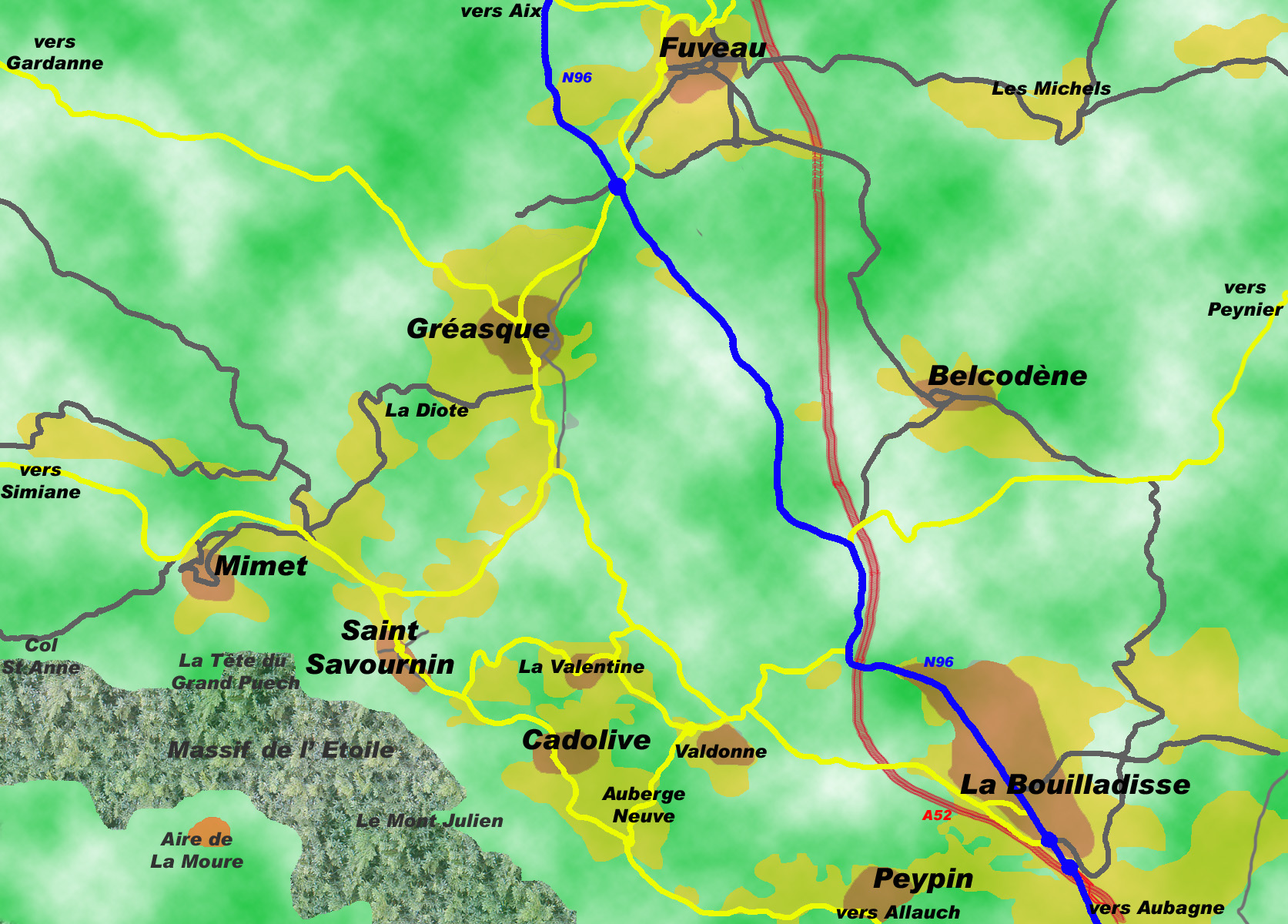 Plan du pays de Saint-Savournin, Bouches-du-Rhône, France : de Fuveau à La Bouilladisse Auteur : civodule